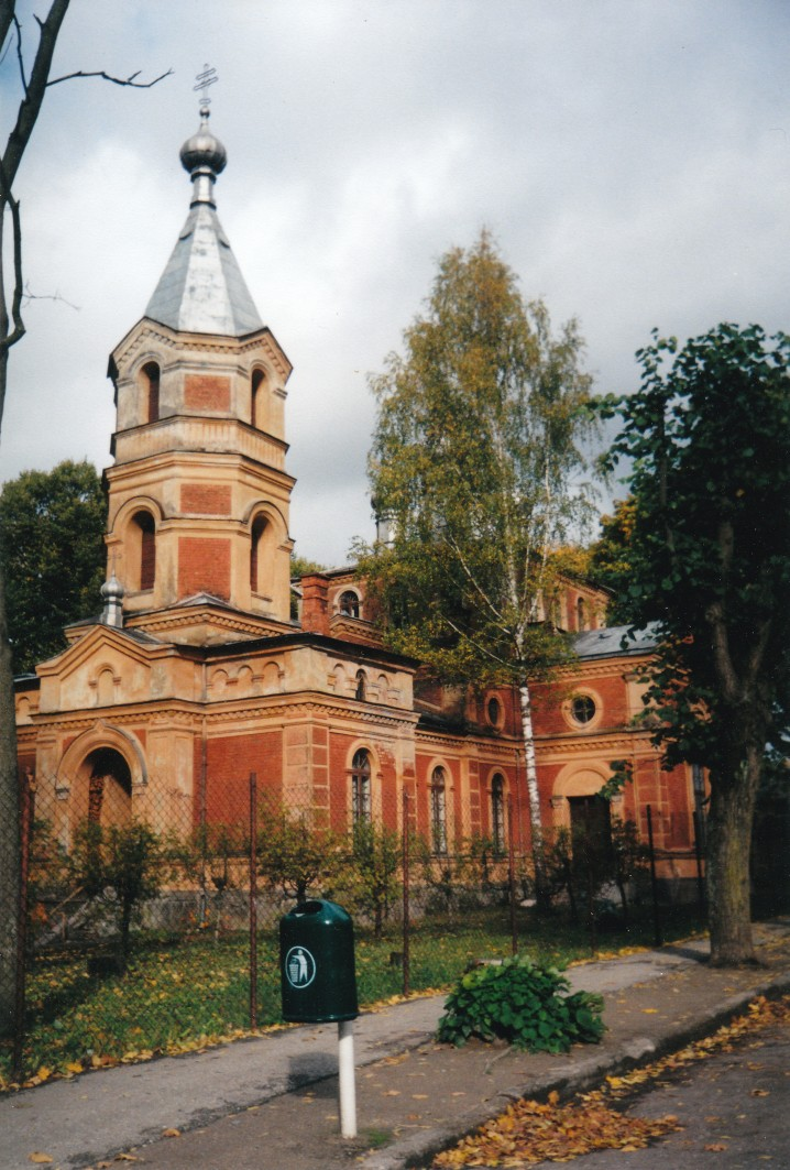 Valga õigeusu kirik